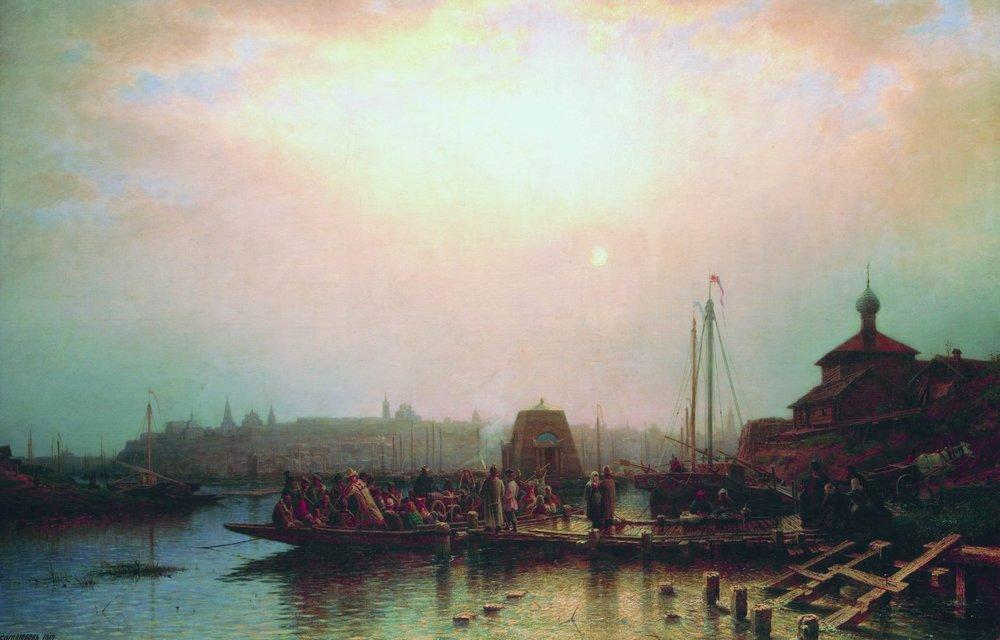 А. П. Боголюбов. Казань. 1862. 124x188 см